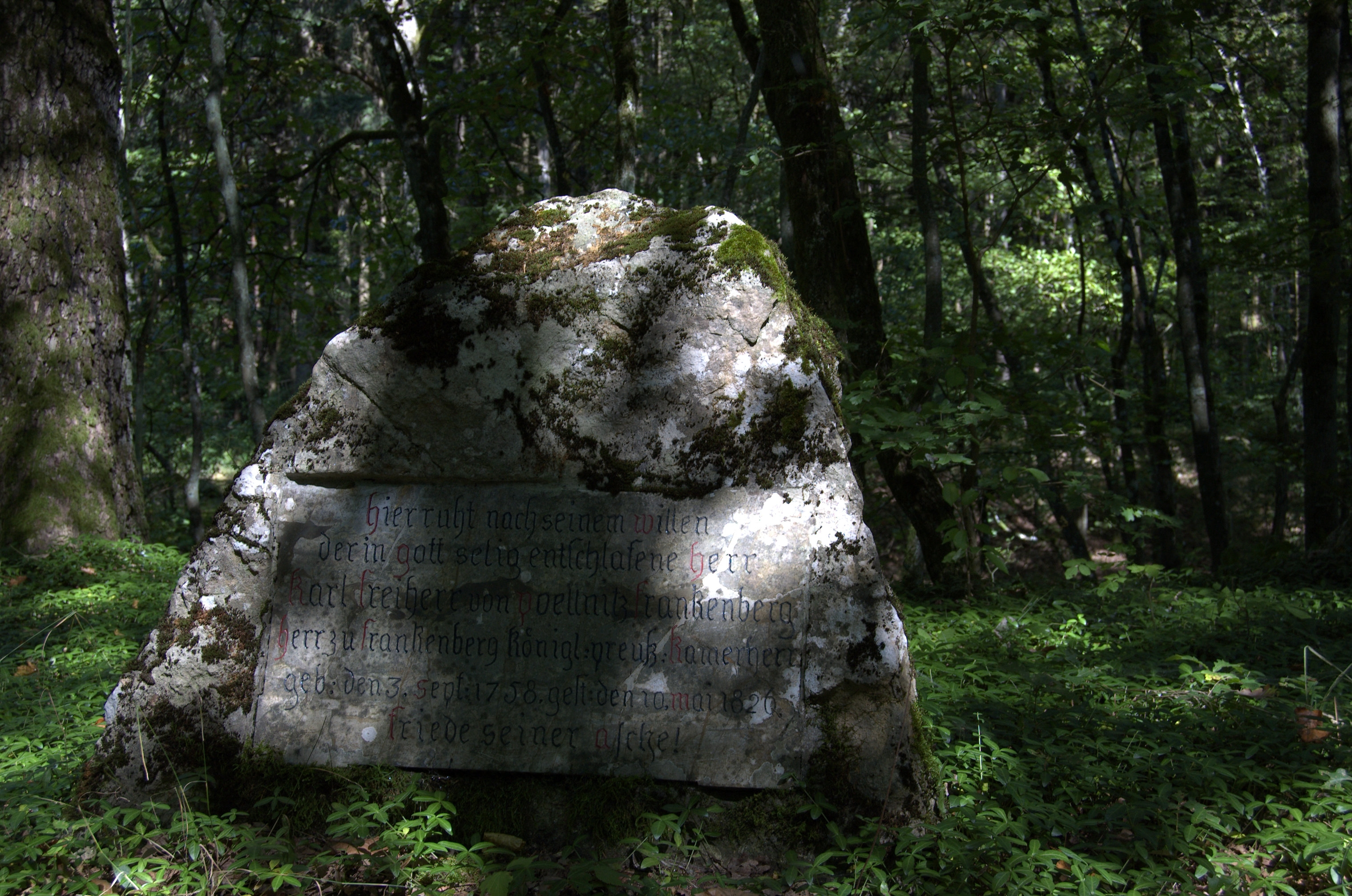 Grabstein des Karl Freiherr von Poellnitz Frankenberg am Scheinbergsee / Schloss Frankenberg